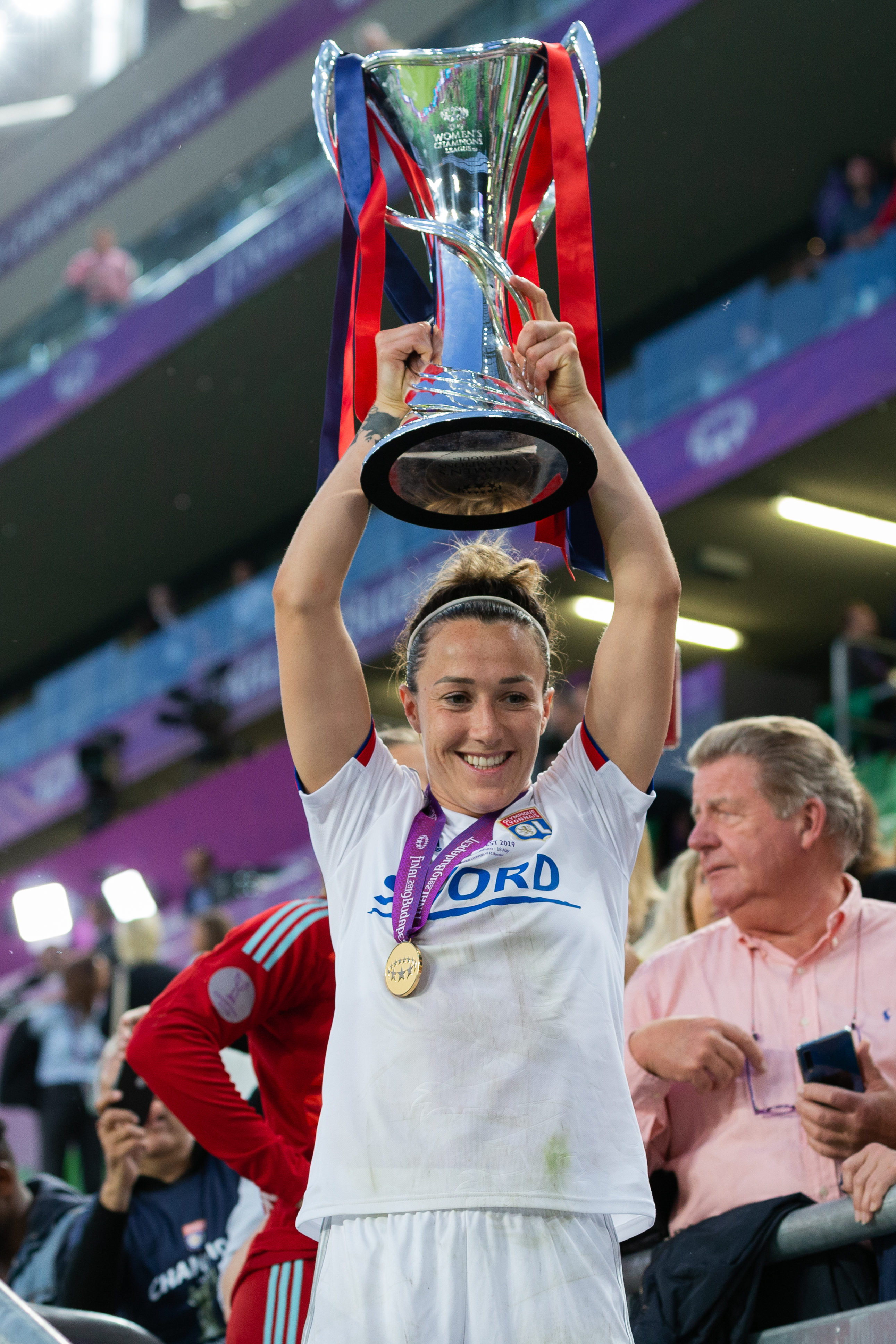 Fußball, Frauen, UEFA Women's Champions League, Olympique Lyonnais - FC Barcelona; Lucy Bronze (Olympique Lyon, 2) feiert mit dem Pokal; Jubel, celebration